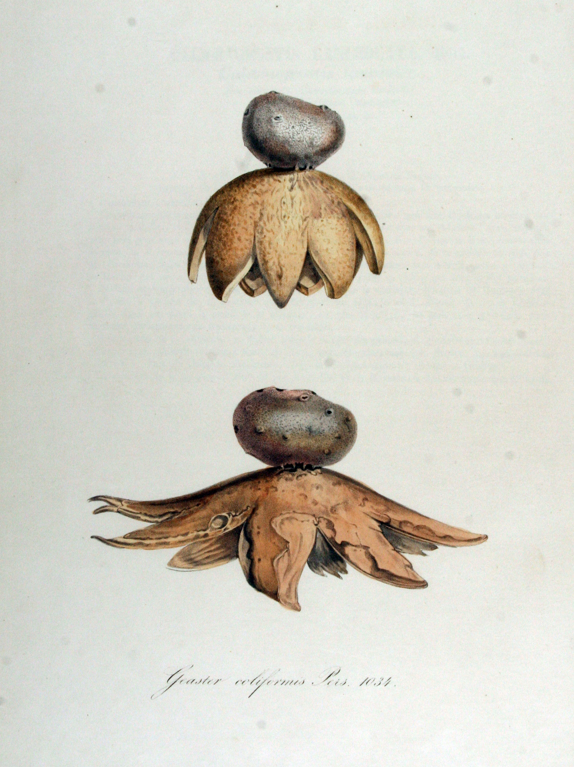 Geaster coliformis